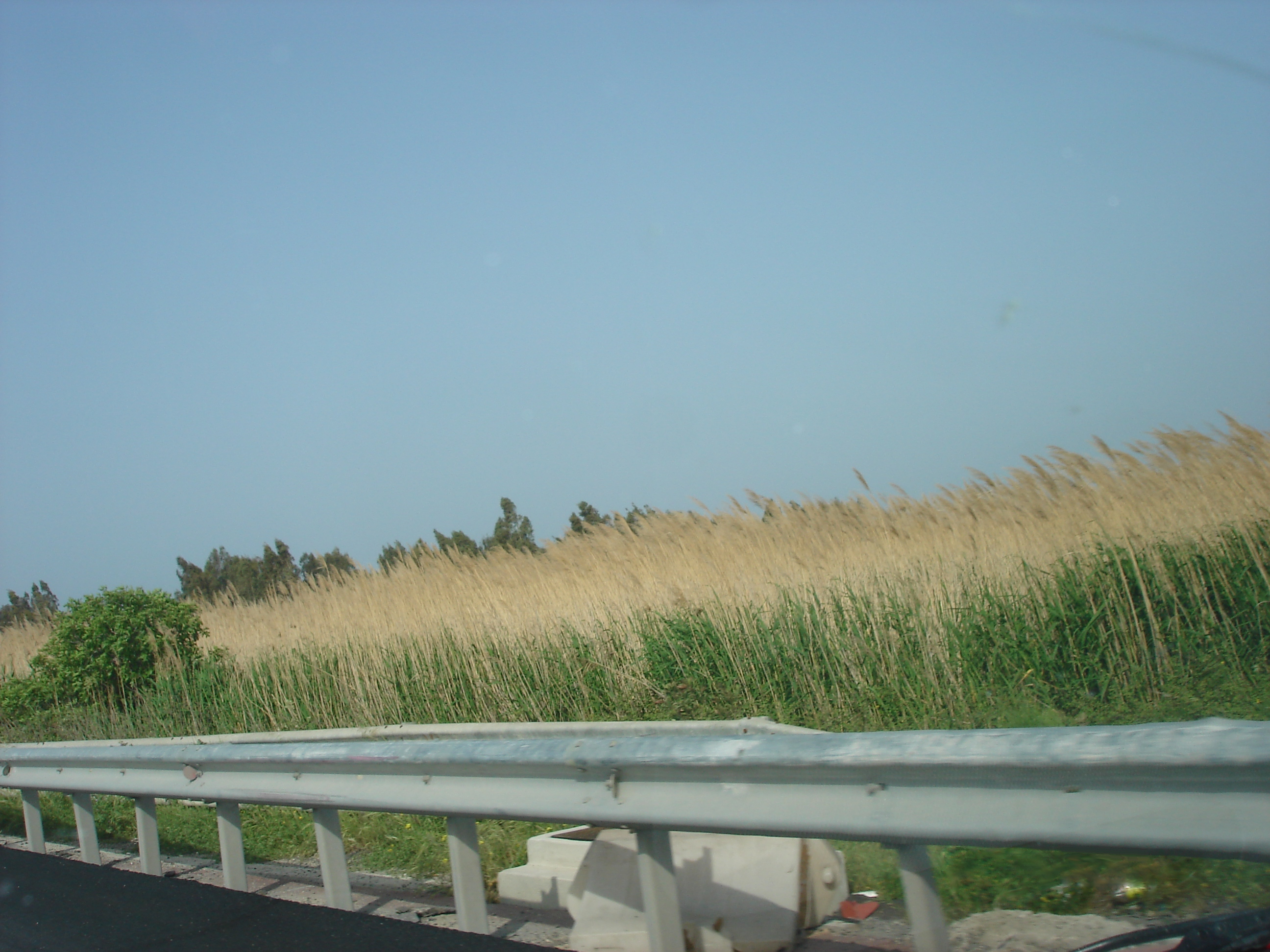 Agyia cape in patras GreecceΑγυιά , ακρωτήριο, έλος και συνοικία της Πάτρας